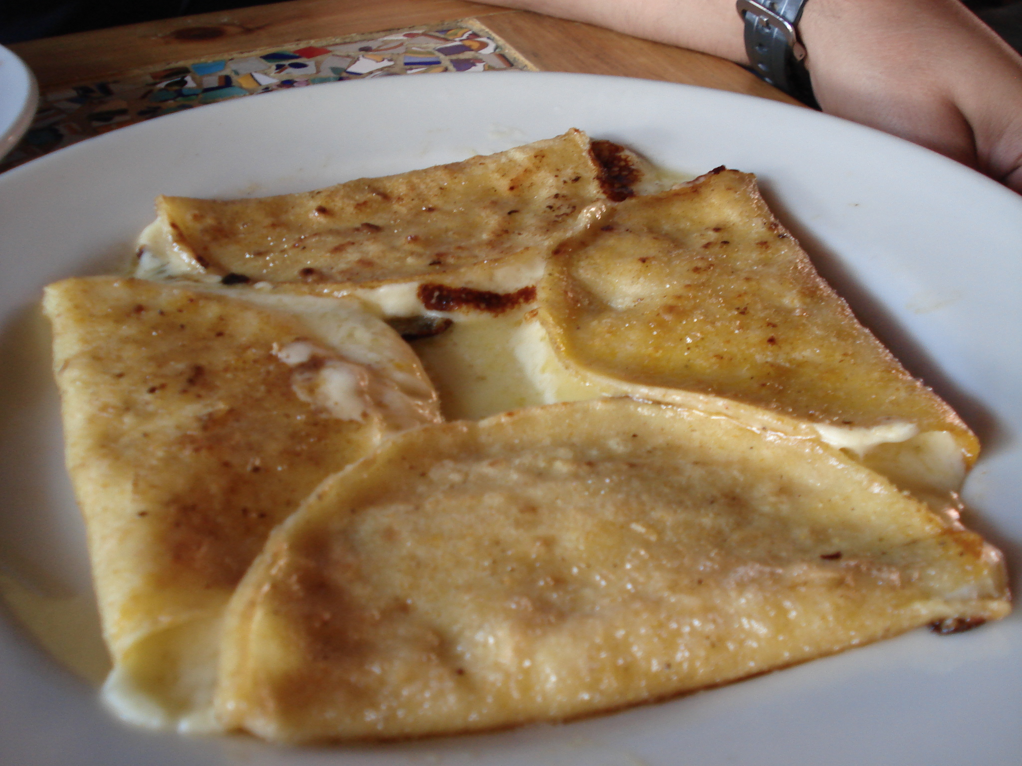 Padrísimo, El Hatillo